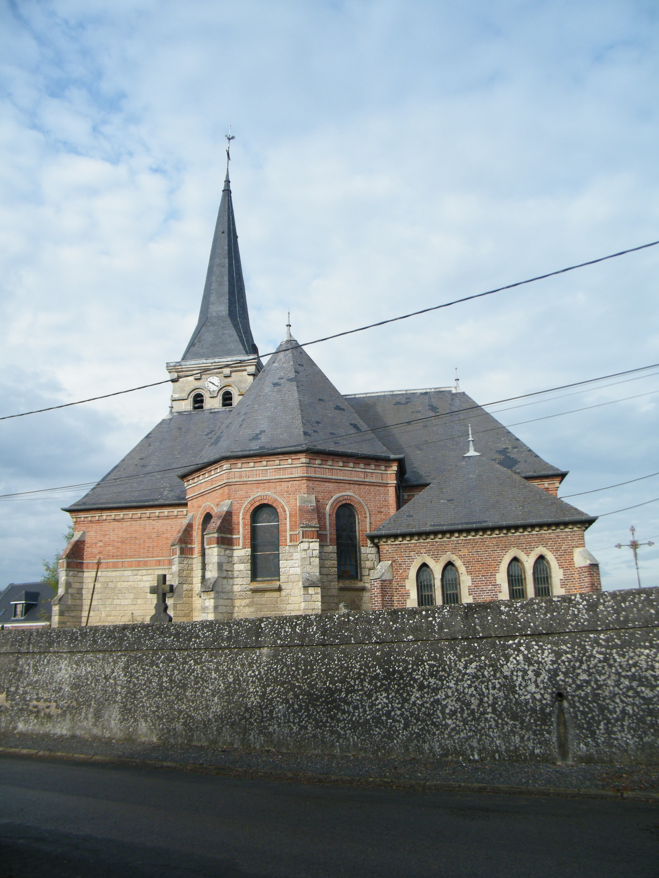 église.